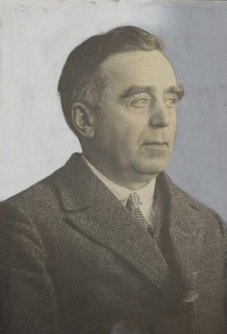 De heer J.G. Legro is benoemd tot burgemeester van Eelde met toekenning van gelijktijdig eervol ontslag als burgemeester van Oosterhesselen